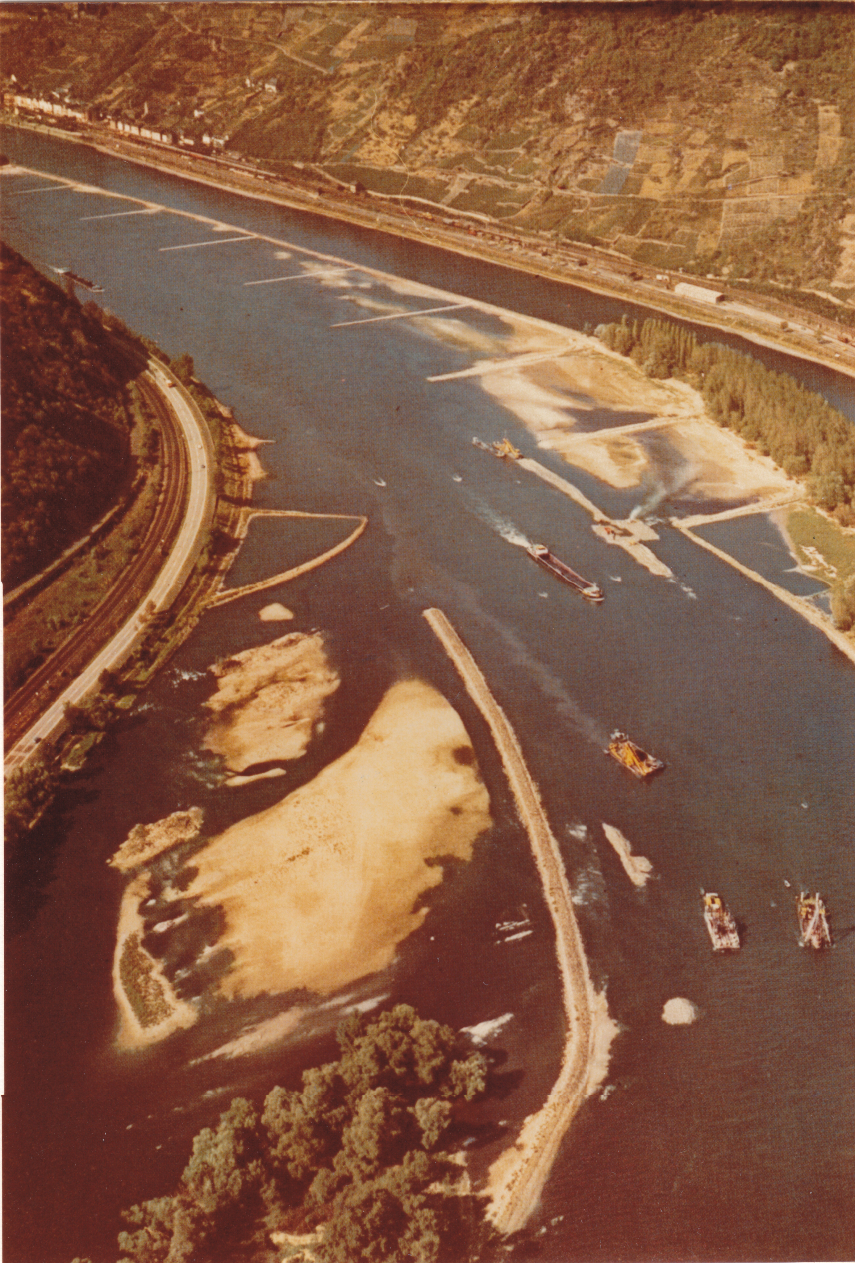 Das Fahrwasser zwischen Kauber und Bacharacher Werth wurde durch Bauarbeiten (linkes Ufer) im Sommer 1976 entschärft. Blick auf die Bauarbeiten im Sommer